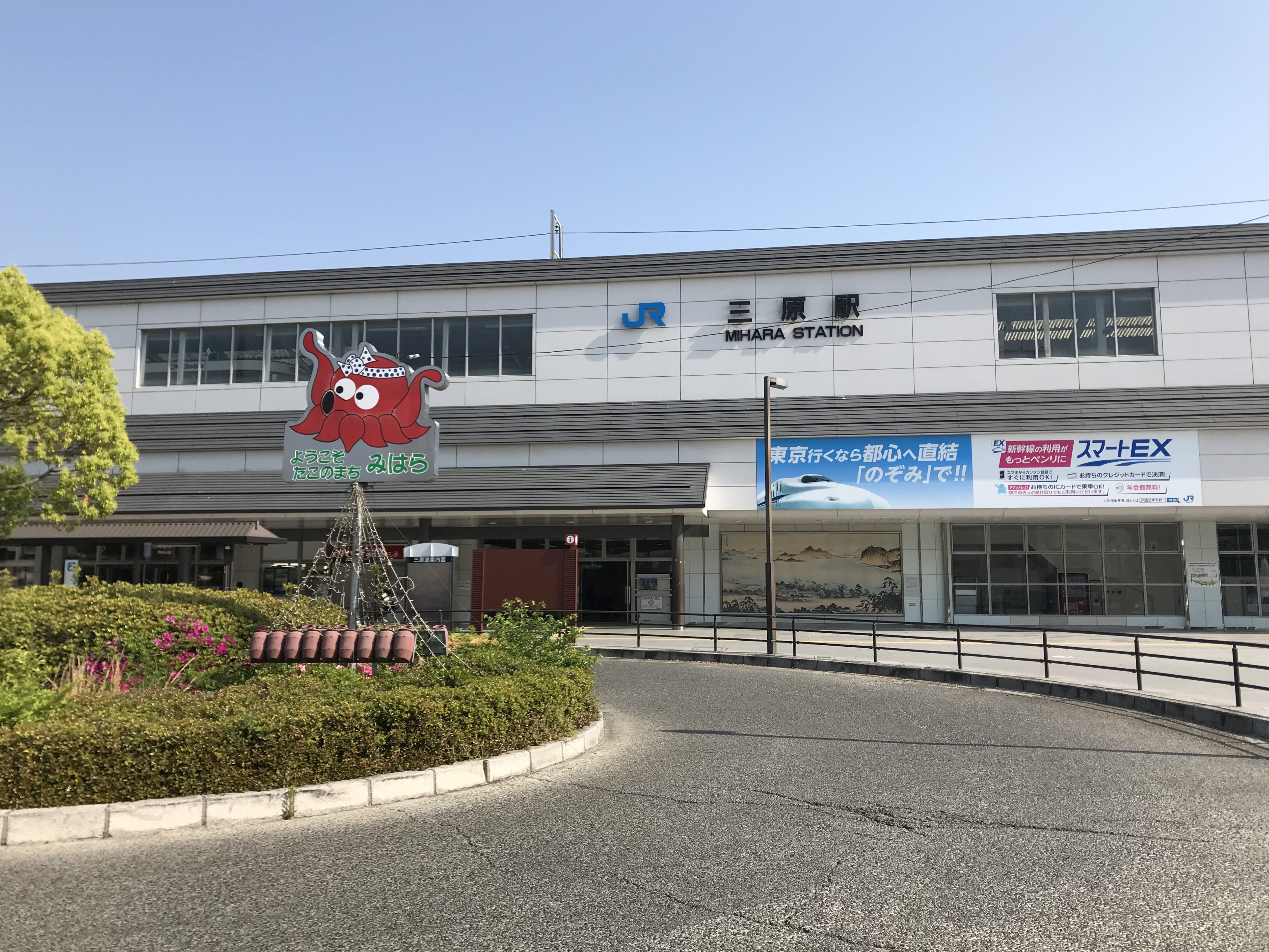 三原駅の駅舎